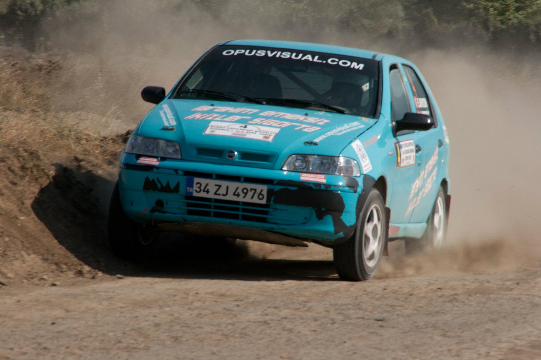 Engin Apaydın tarafından kullanılan Palio marka bir ralli aracı.